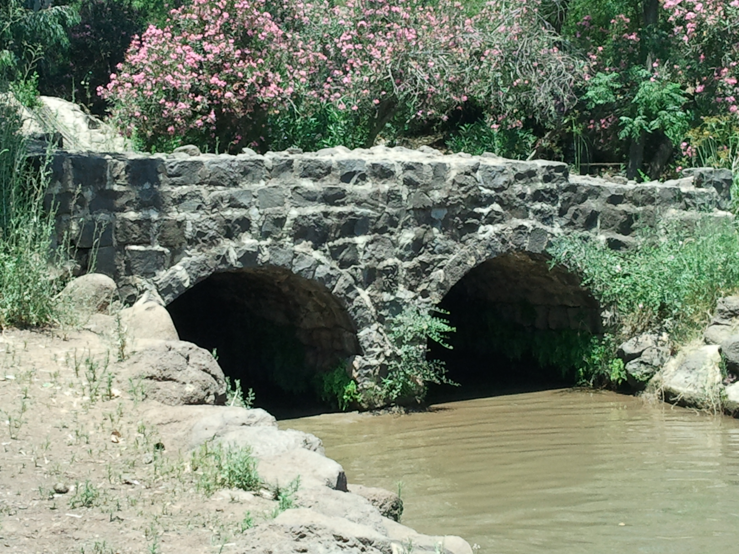 Category:Jordan River park, northern from Sea of Galilee, Israel פארק הירדן שוכן בצפונה של הכנרת. בתחום הפארק נמצא תל בית צידה טחנות הקמח